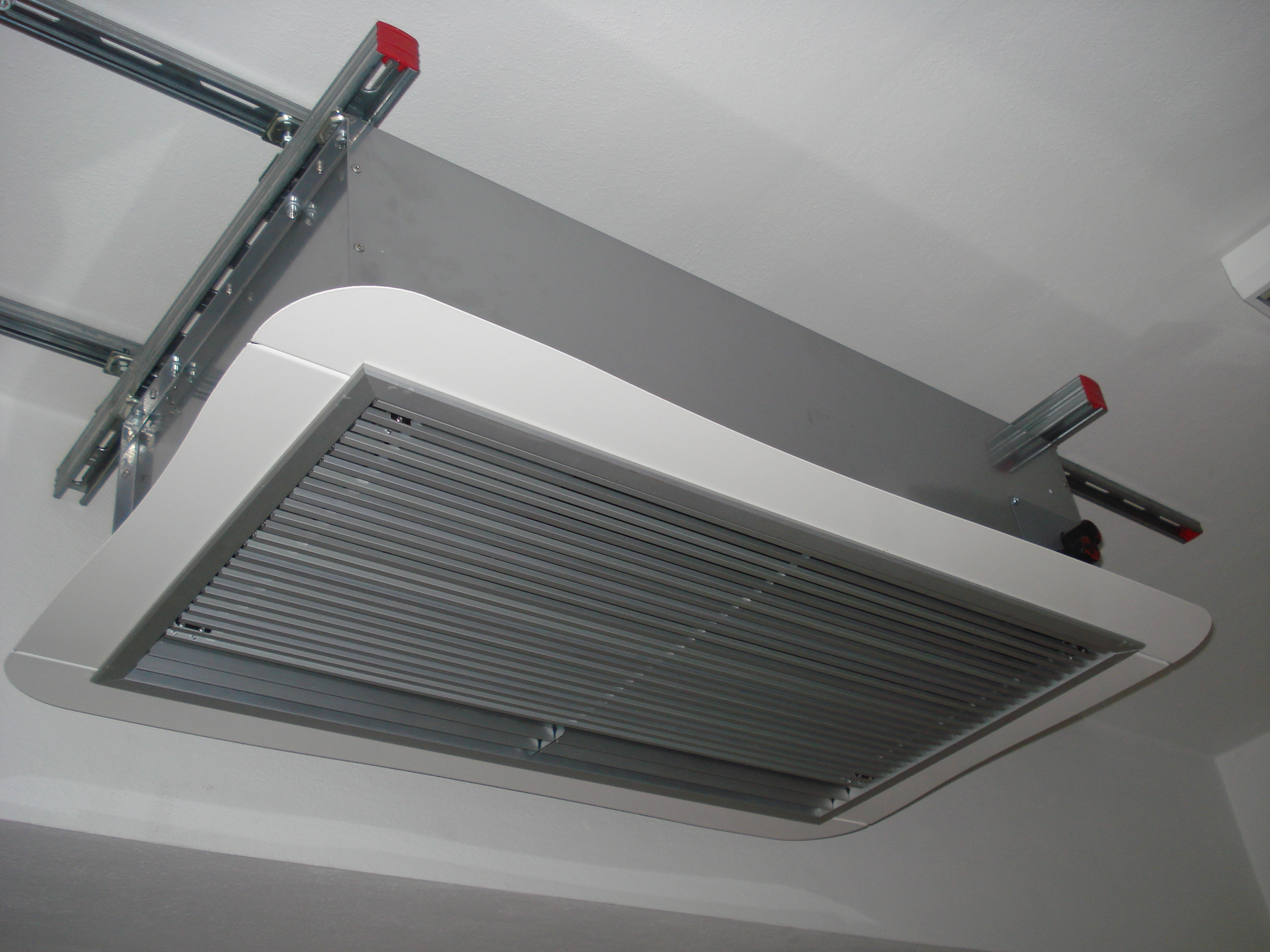 Завеса Stavoklima Econ-C, скрытого монтажа